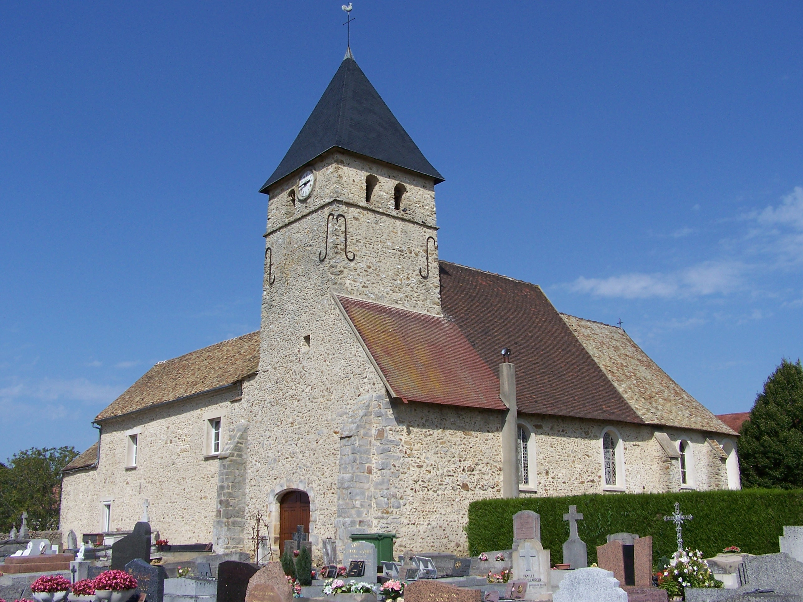 Église de Tacoignières (Yvelines, France)